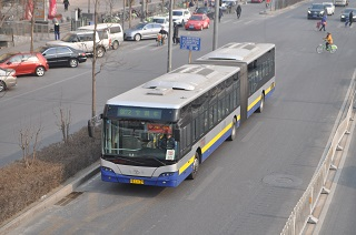 快速公交2号线常用车型